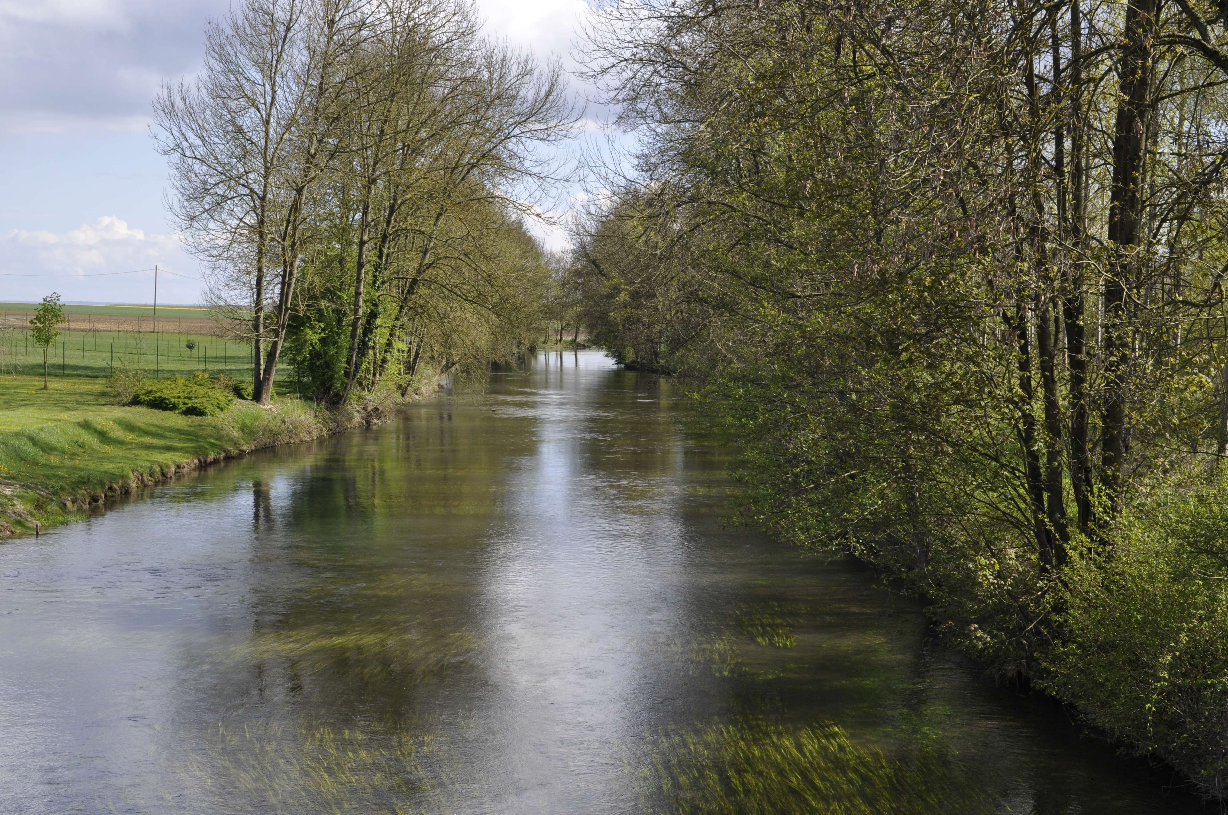 Pont sur la Bèze à Bèzouotte (Côted 'Or).